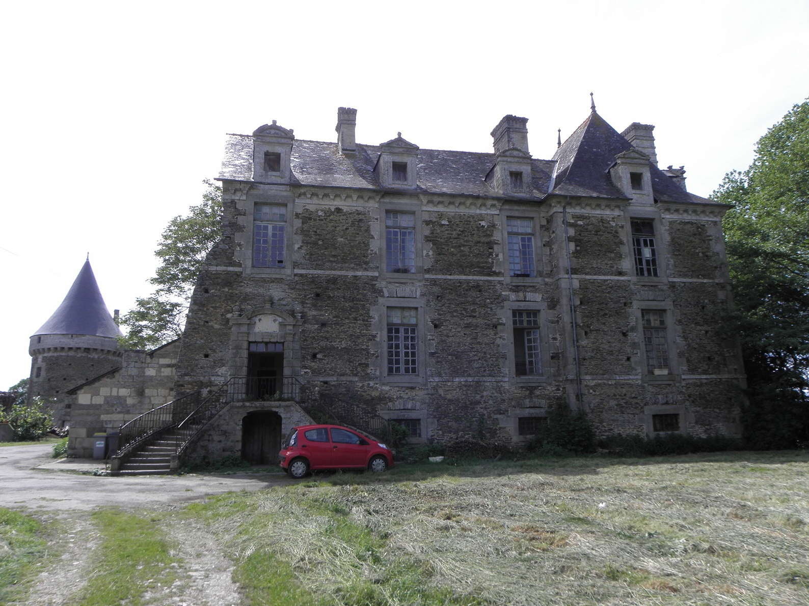 Château du Lou-du-Lac (35).